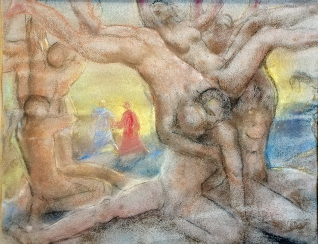 Dankes Inferno, Hauptwerk von F.A. Weinzheimer